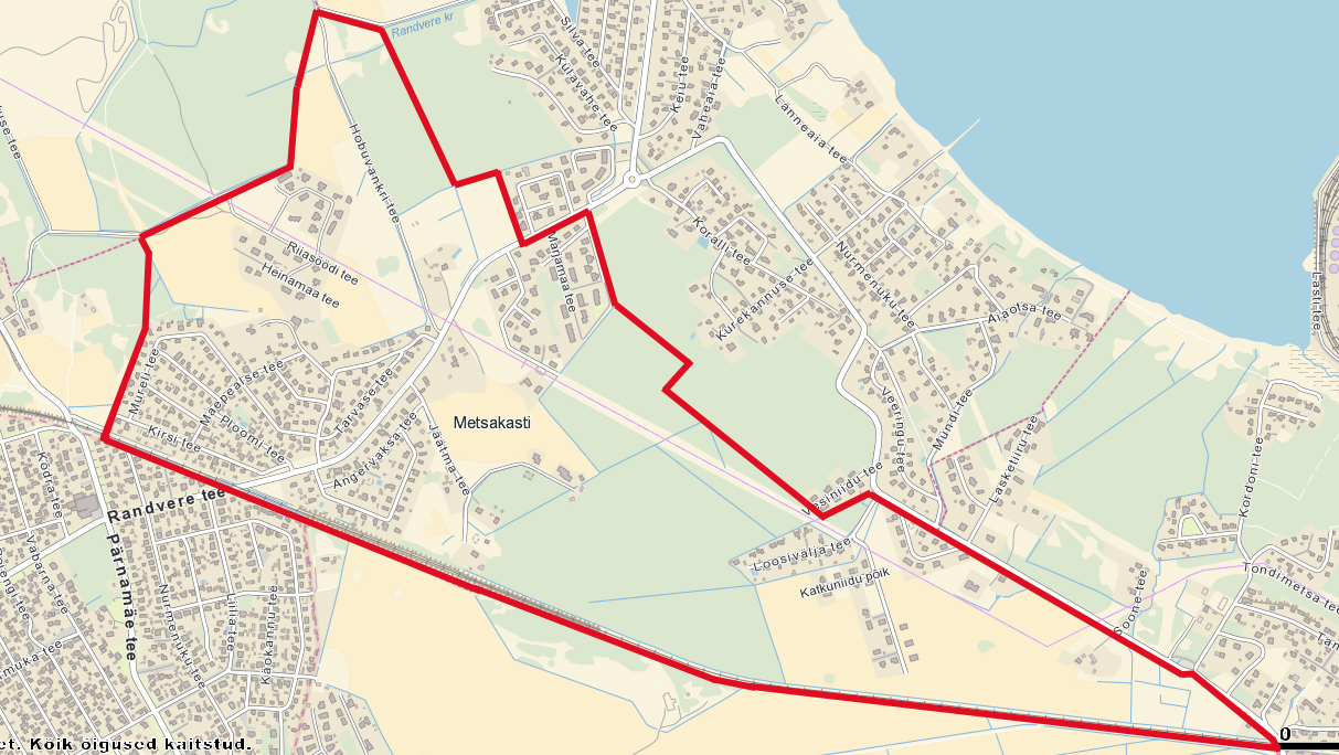 Metsakasti küla, Viimsi vald, Harjumaa